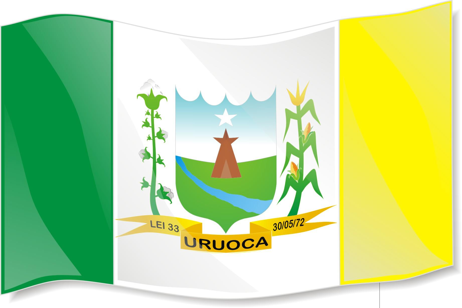 Bandeira do município de Uruoca - CE. Somente em 1972, depois de 15 anos de emancipação política, o município de Uruoca teve a sua primeira bandeira municipal, tendo as cores da BANDEIRA DO BRASIL, com o centro branco, numa dimensão de cinquenta por cento(50%) do do seu tamanho, vinte e cinco por cento (25%), verde à esquerda e vinte e cinco por cento (25%) amarelo à direita. Ficando no centro um brasão em formato de um URU (utensílio de palha) com uma OCA em seu inferior, uma estrela no seu alto e um riacho na parte inferior.